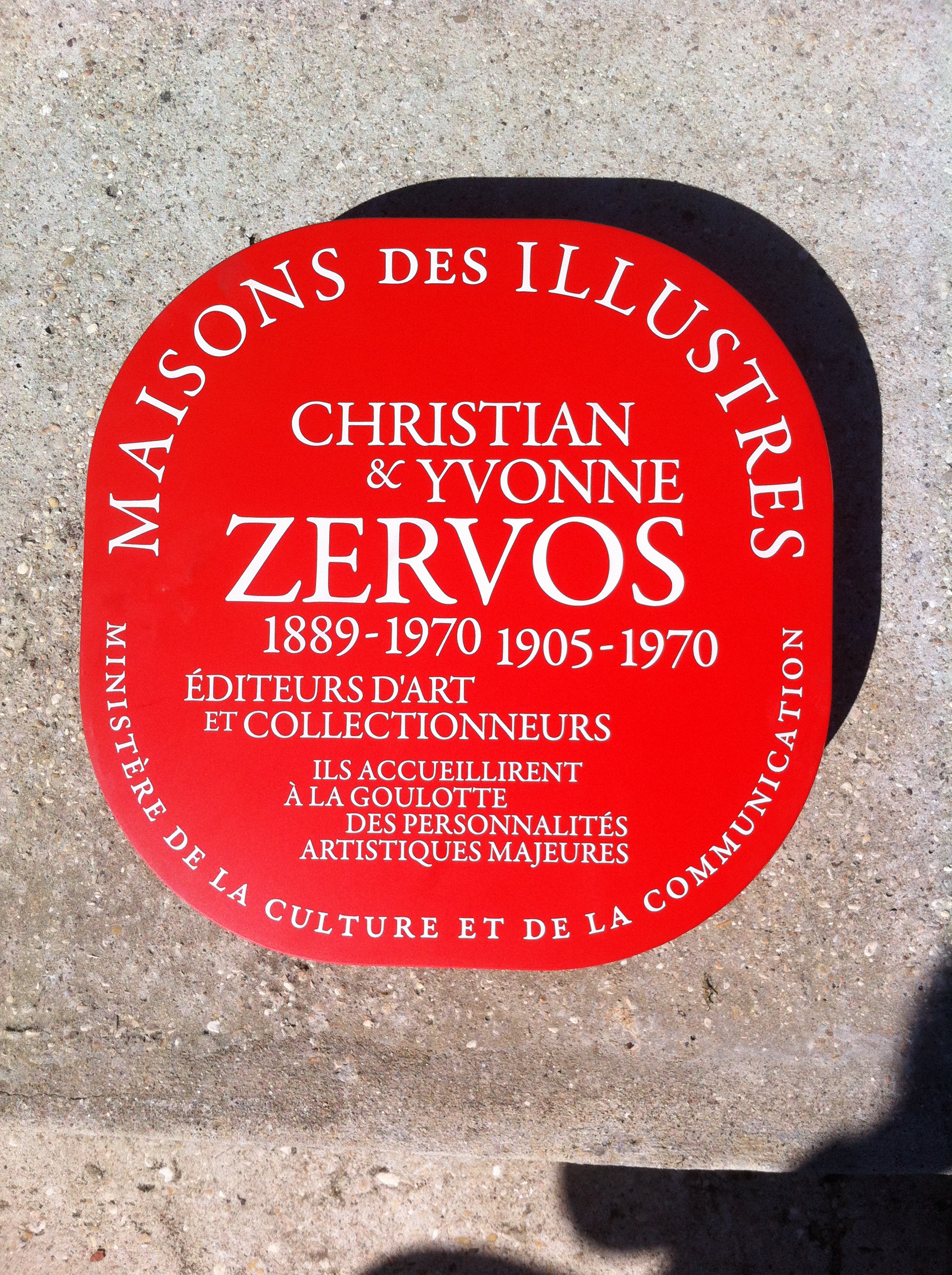 Label de la Maison des illustres, Maison Zervos, à la Goulotte, hameau de Vézelay